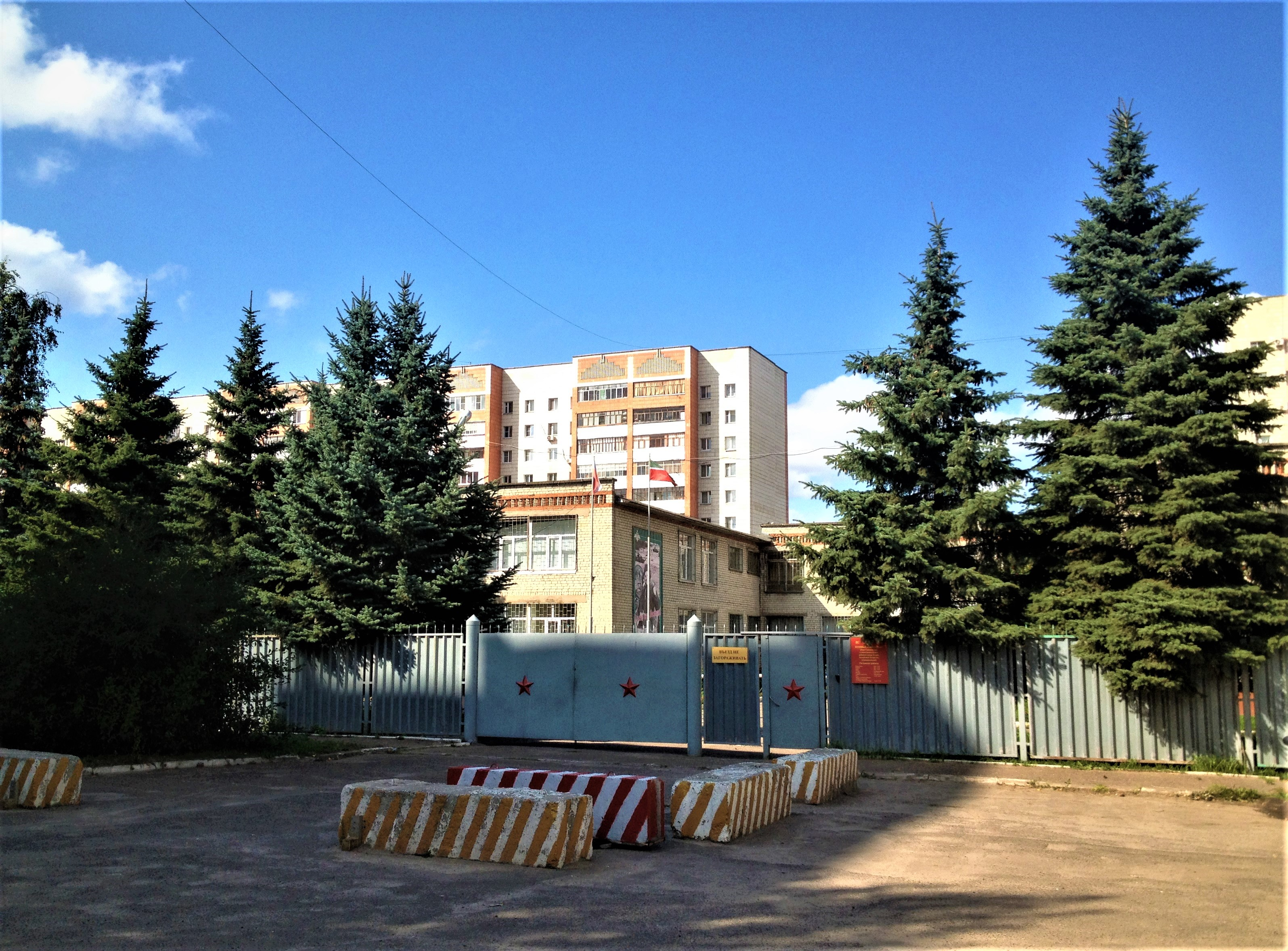 Отдел Военного комиссариата Республики Татарстан по Ново-Савиновскому и Авиастроительному районам (г. Казань, ул. Лукина, д. 47 А).